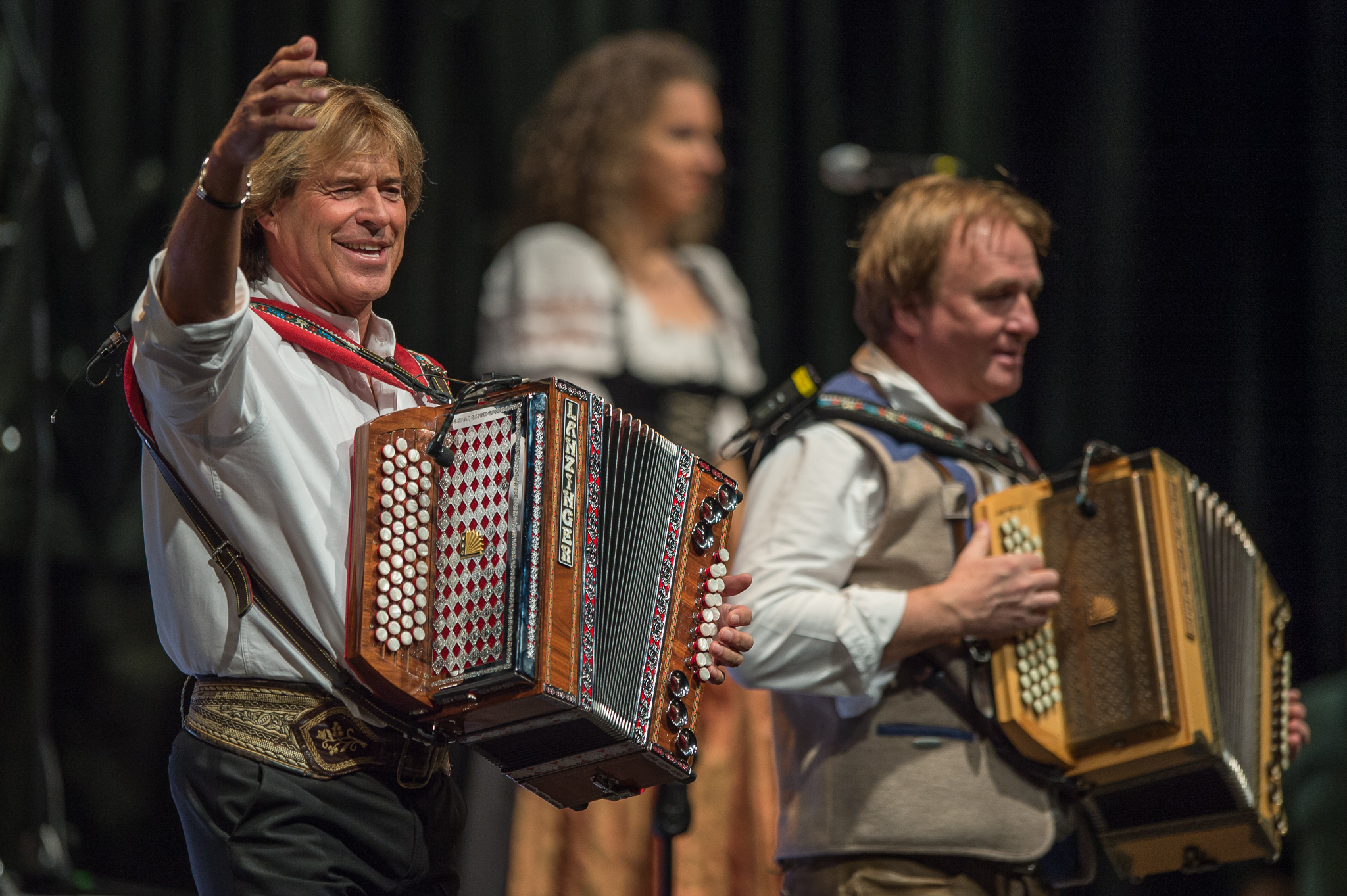 ARGO-Konzerte,Frankenhalle,Hansi Hinterseer,Konzert,Livekonzert,Livemusik,Musik,Tournee 2016